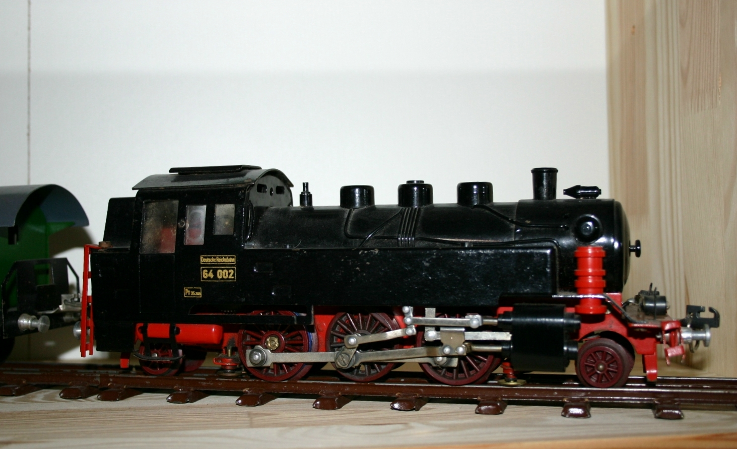 Modell-Lokomotive der Baureihe 64 von Stadtilm in der Nenngröße 0